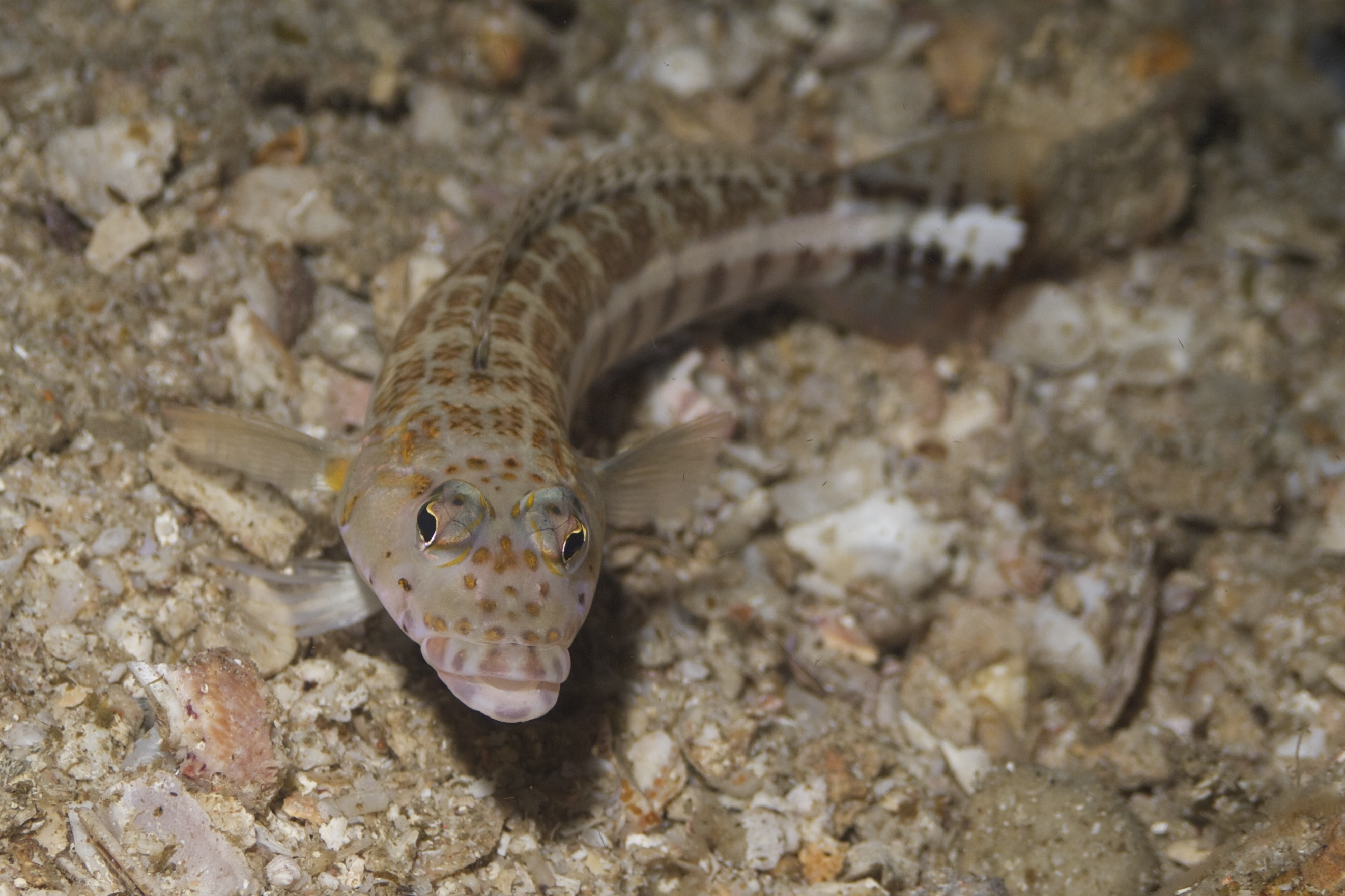 Parapercis sp.